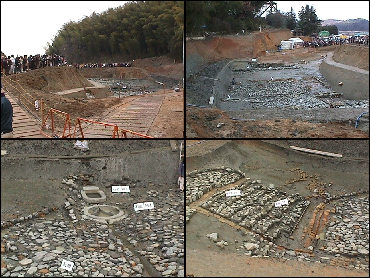 奈良県明日香村で発掘された酒船石遺跡の一般見学会の様子、2000年2月27日 撮影。